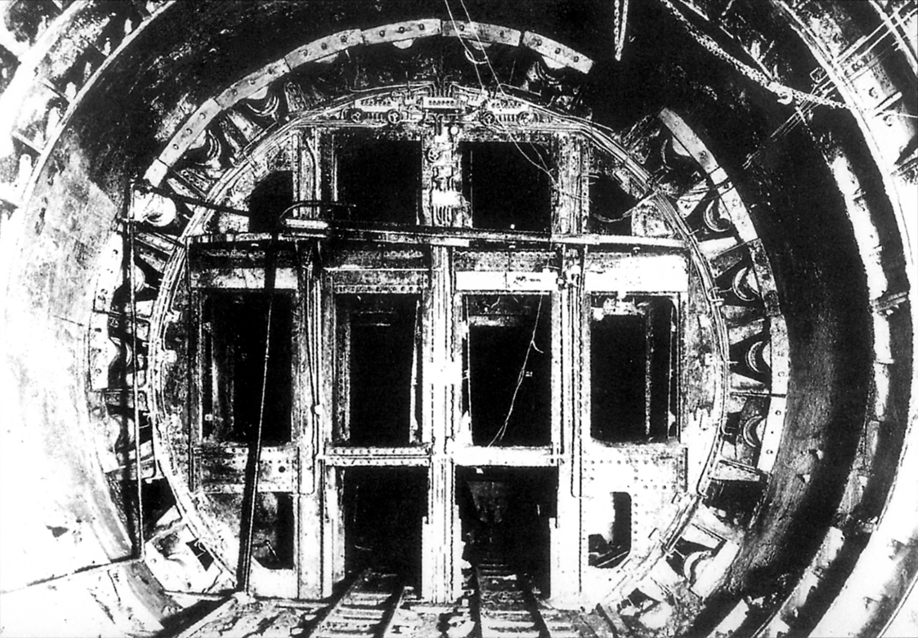 Travaux de la ligne 7 du métro de Paris, France. Le bouclier de la traversée sous-fluviale.